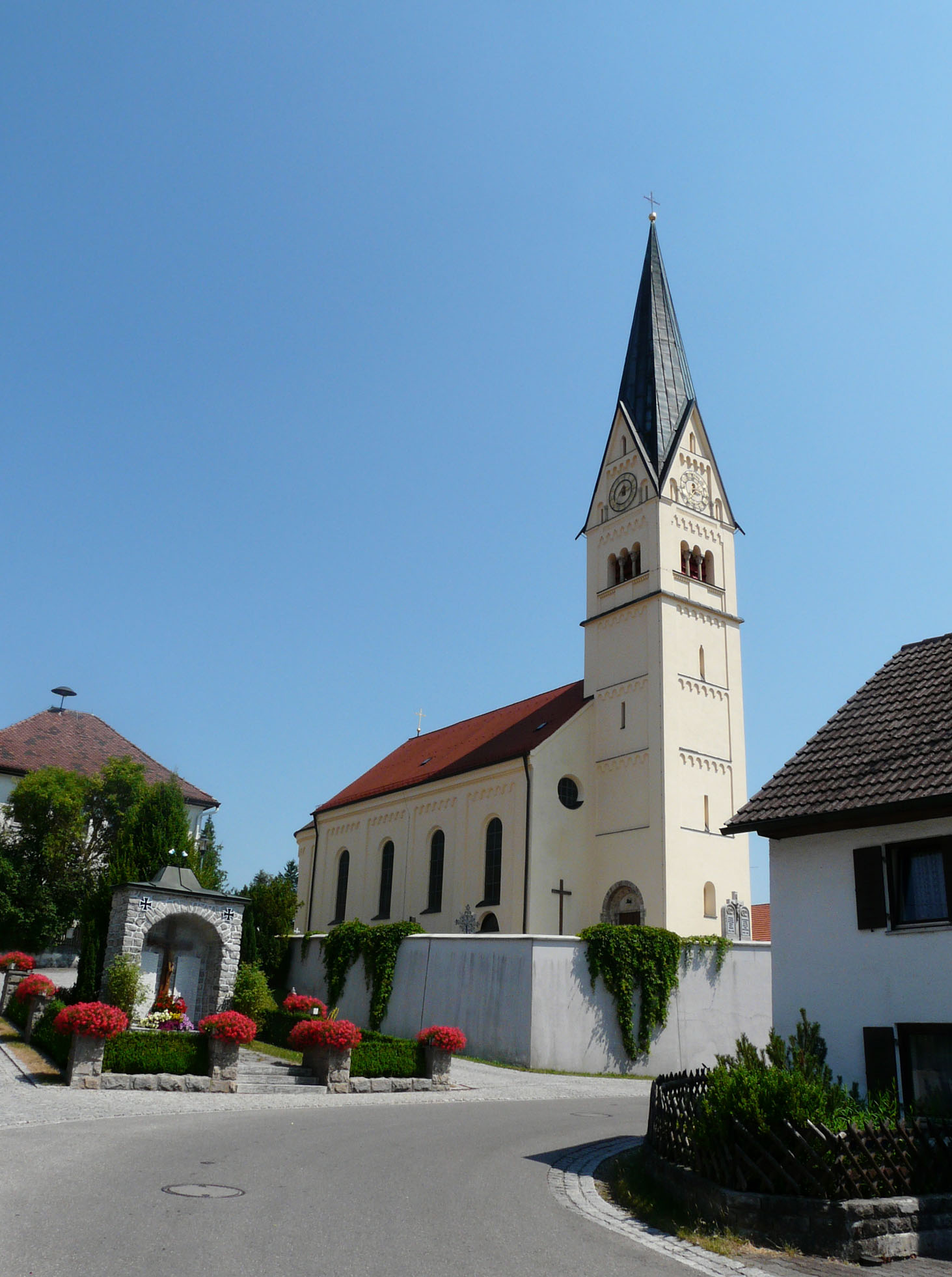 Kirche in Hofstetten